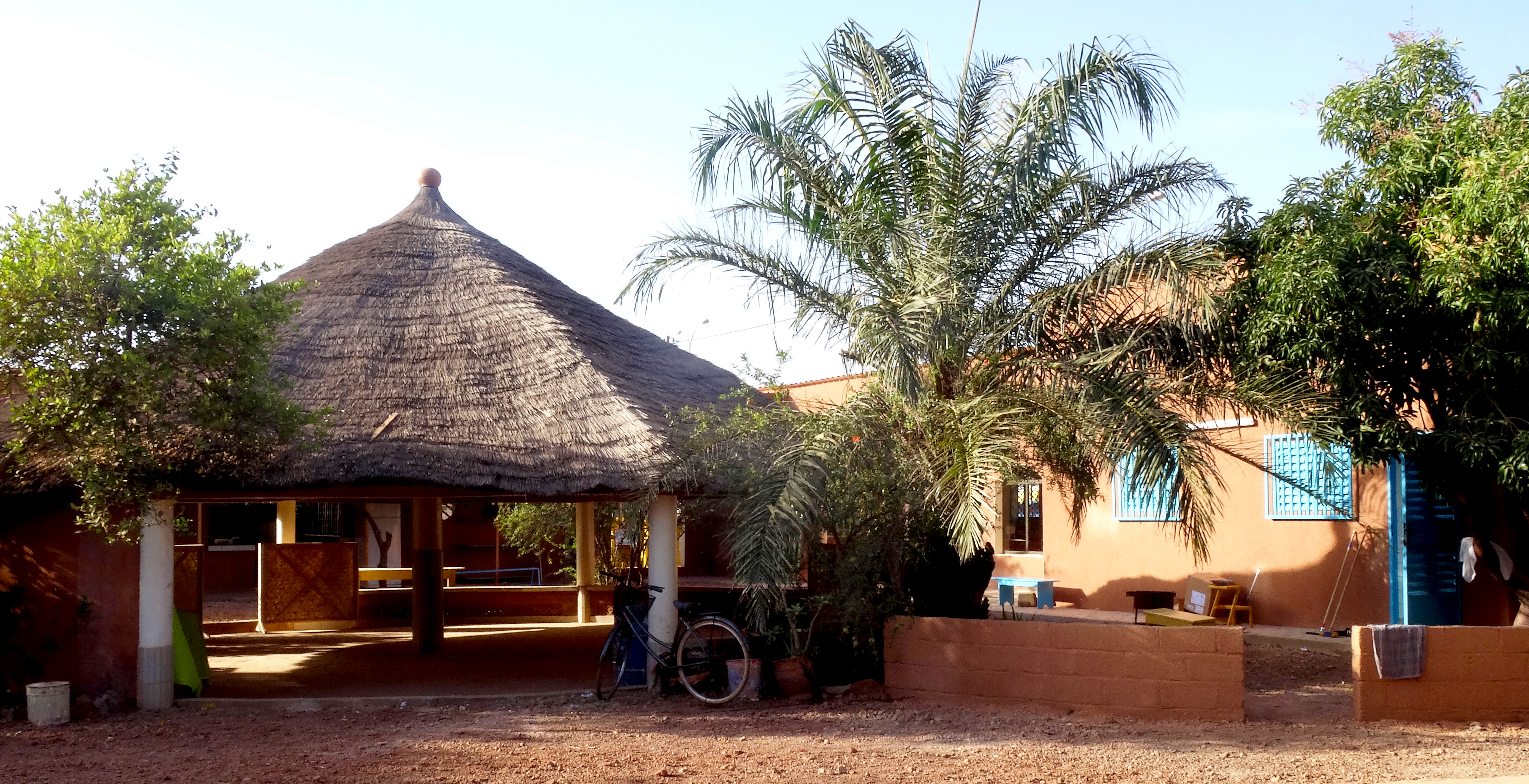 Diese Rundhütten werden für verschiedene Veranstaltungen von AMPO genutzt.